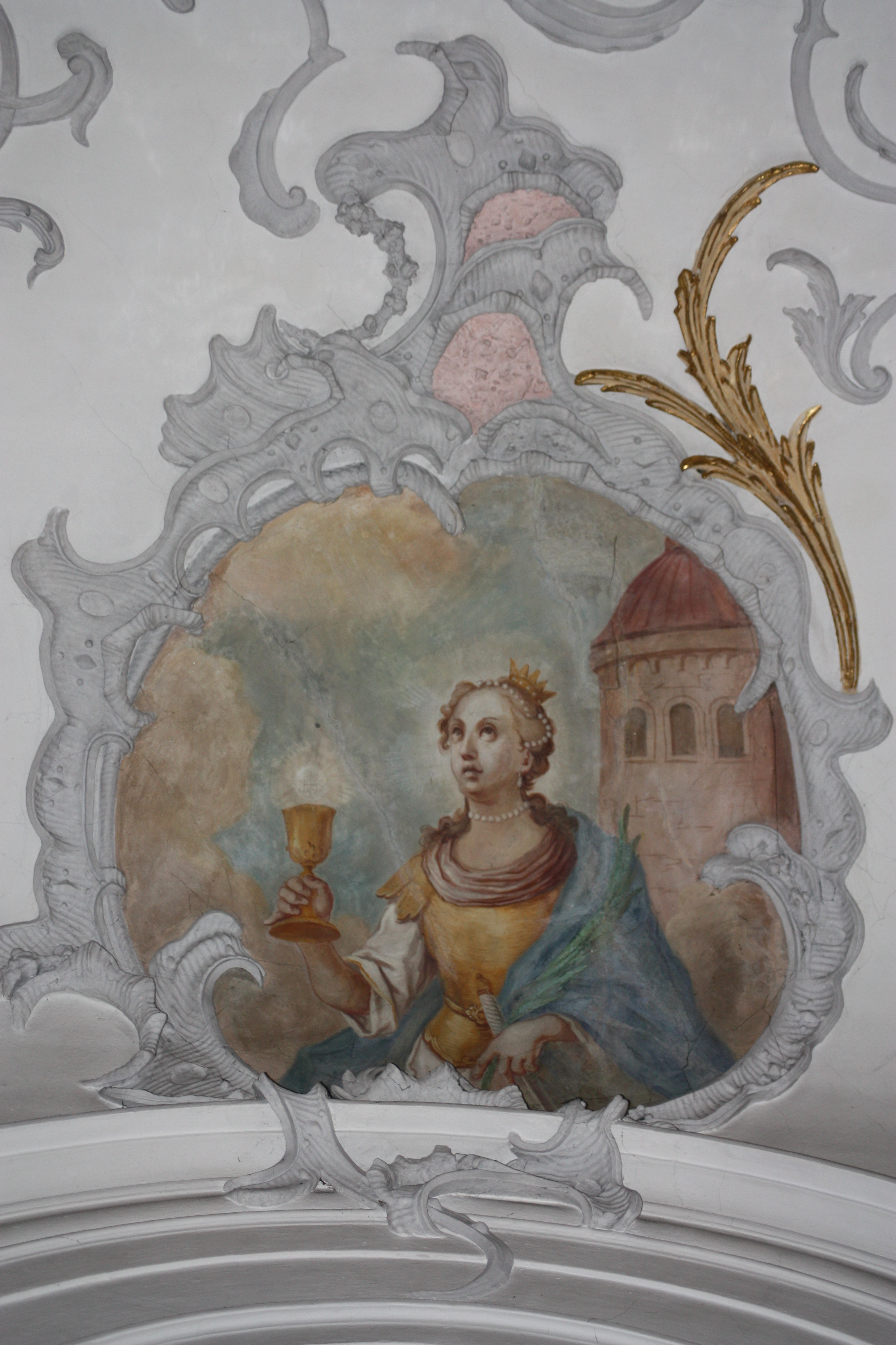 Deckenfresko in St. Ulrich, Amendingen